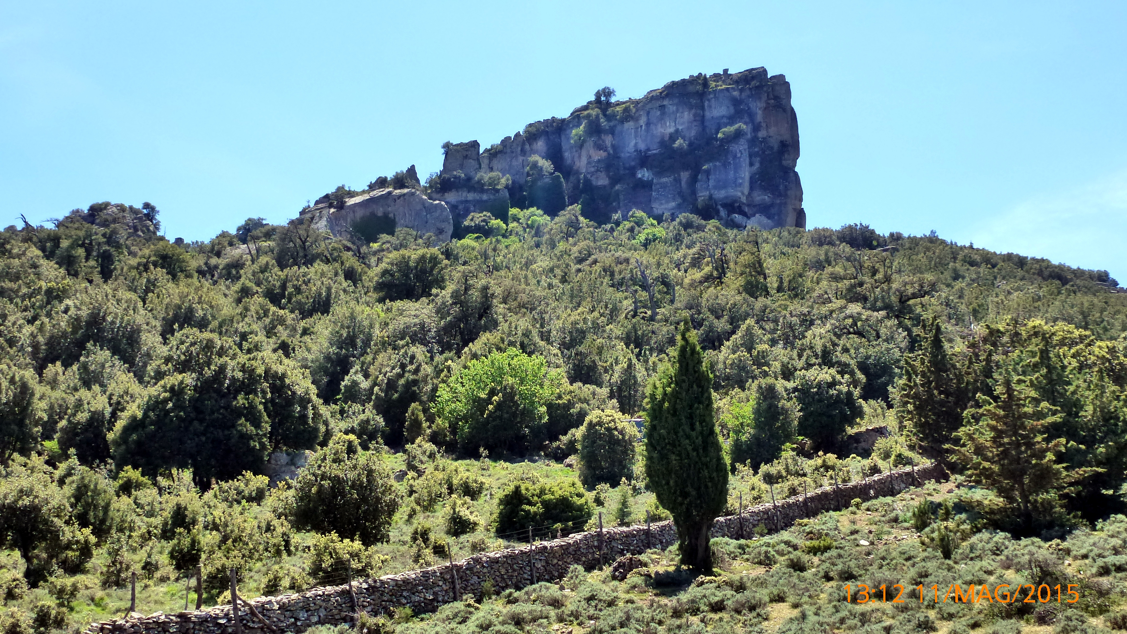 Monte Novo San Giovanni